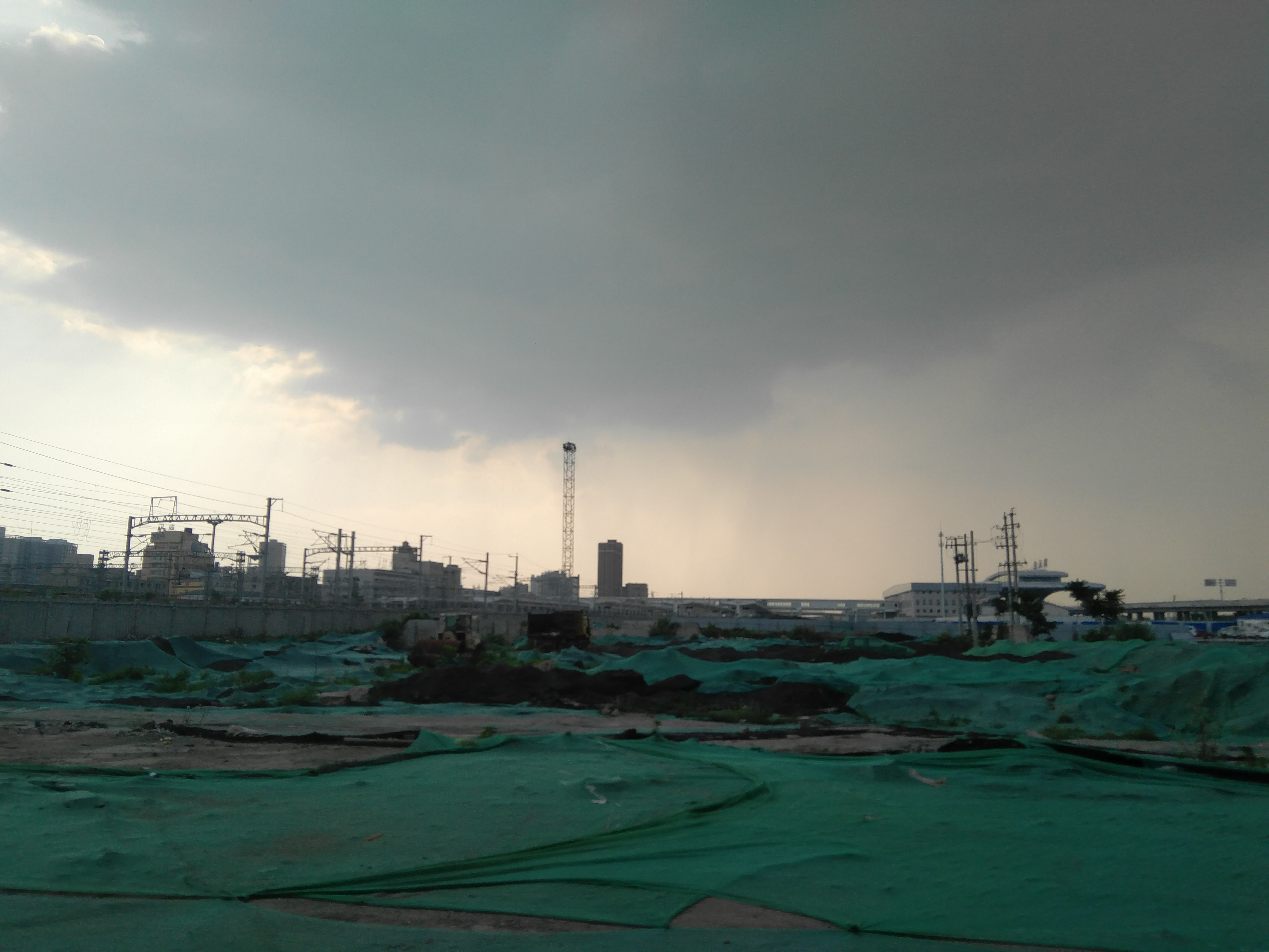 商丘站建设中的商杭场